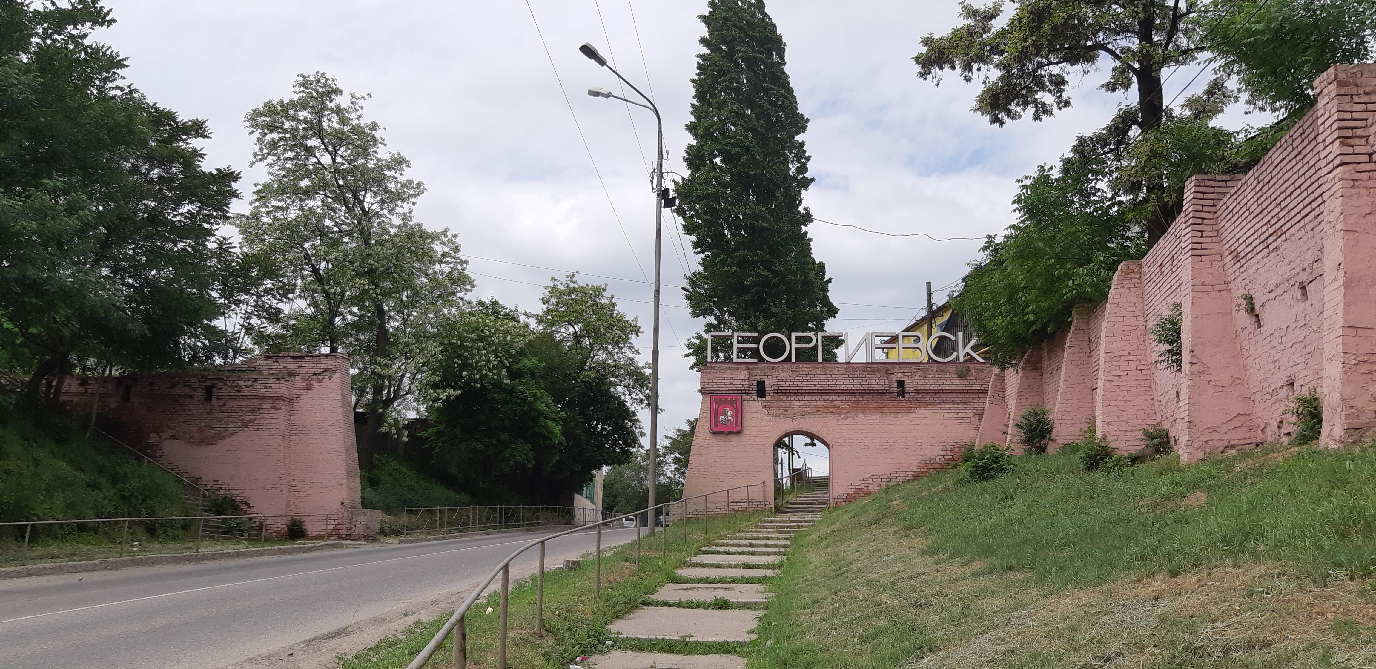 Фрагмент крепостной стены (поздняя реплика) Георгиевска.